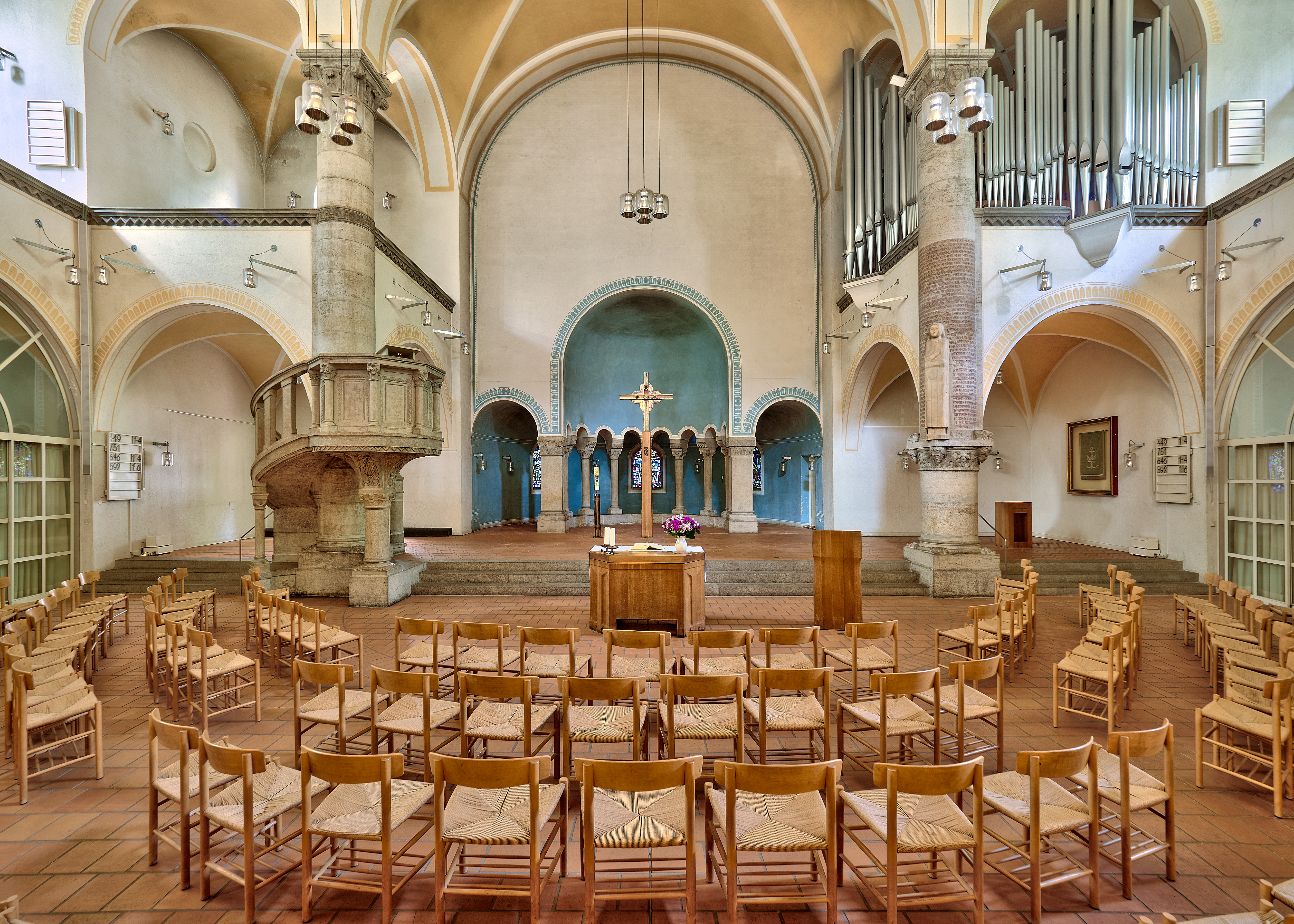 Neoromanische Zentralbau im Stile des Historismus. In dieser Kirche wurden Elemente aus verschiedenen Epochen zusammengeführt und um zeitgenössische Kunst ergänzt. Die Renovierung und der Umbau in 1982/1983 wurde von dem Architekten Theo Steinhauser durchgeführt. Der Kirchraum wurde verkleinert, und die Nebenräume, die durch Glaswände abgetrennt wurden, können nun als Gemeinderäume genutzt werden.This is a photograph of an architectural monument.